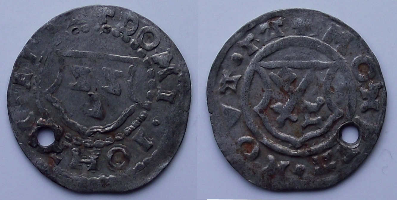 Tartu piiskopi Johannes VI Bey killing